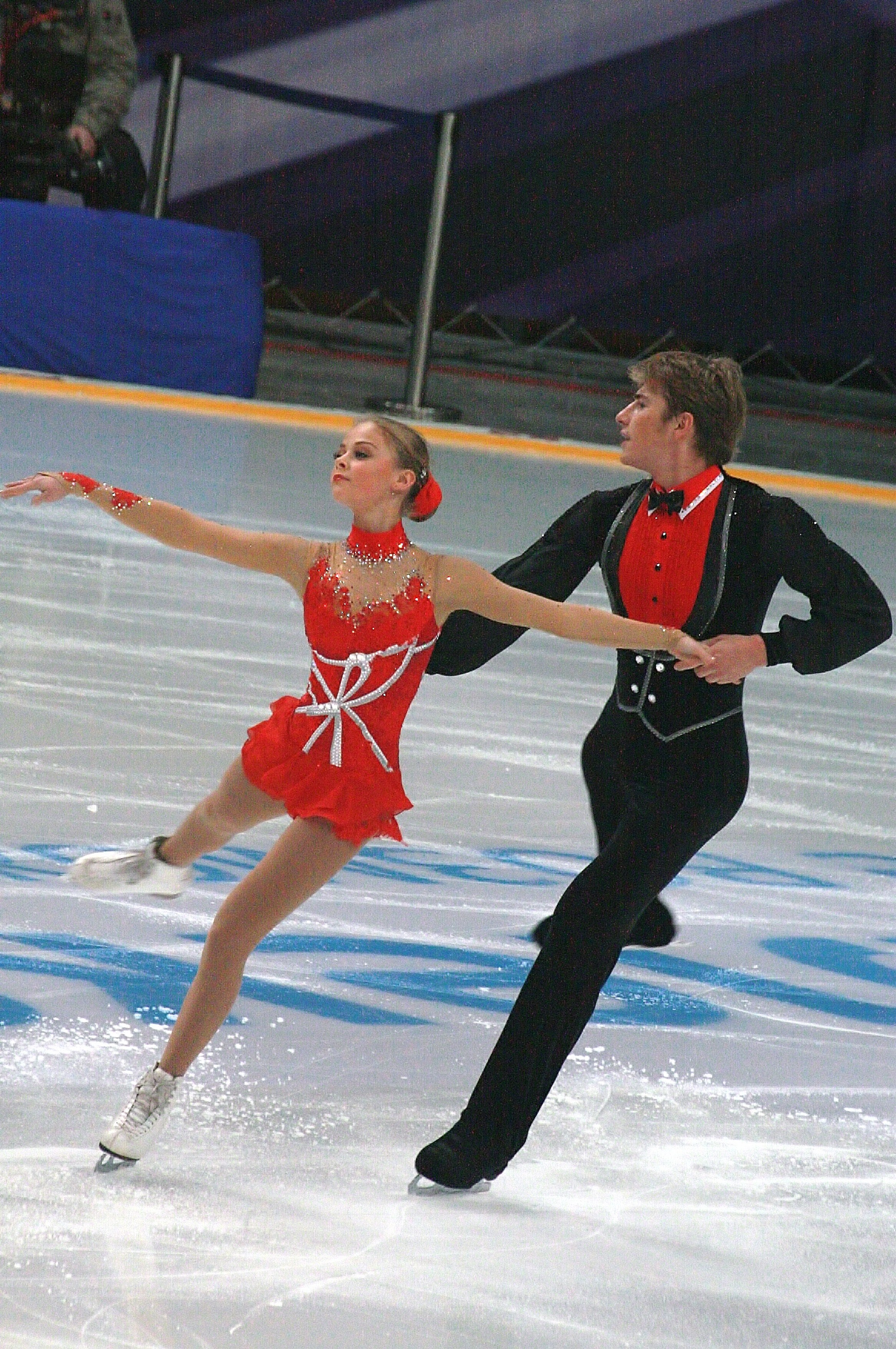 Анастасия Мартюшева и Алексей Рогонов на Кубке Ростелекома 2012. Короткая программа.